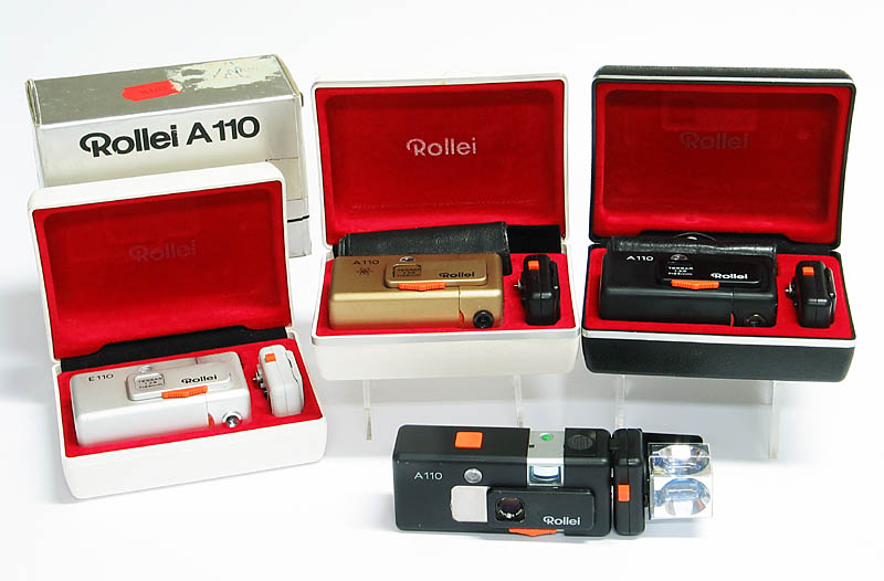 Übersicht der Pocketkameras von Rollei